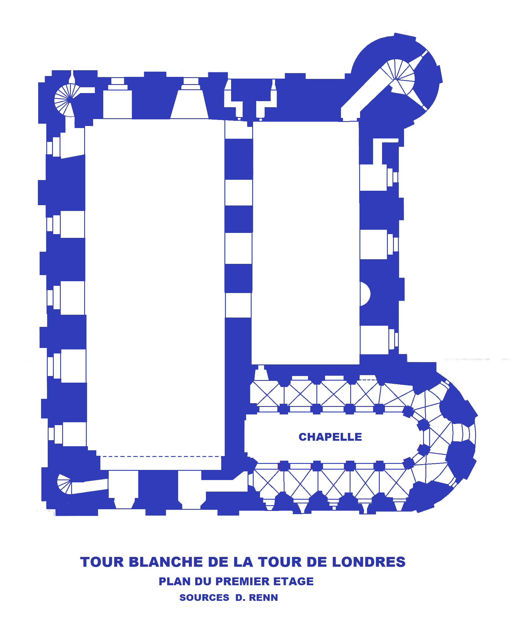 Tour blacnhe de la Tour de Londres, plan du premier étage